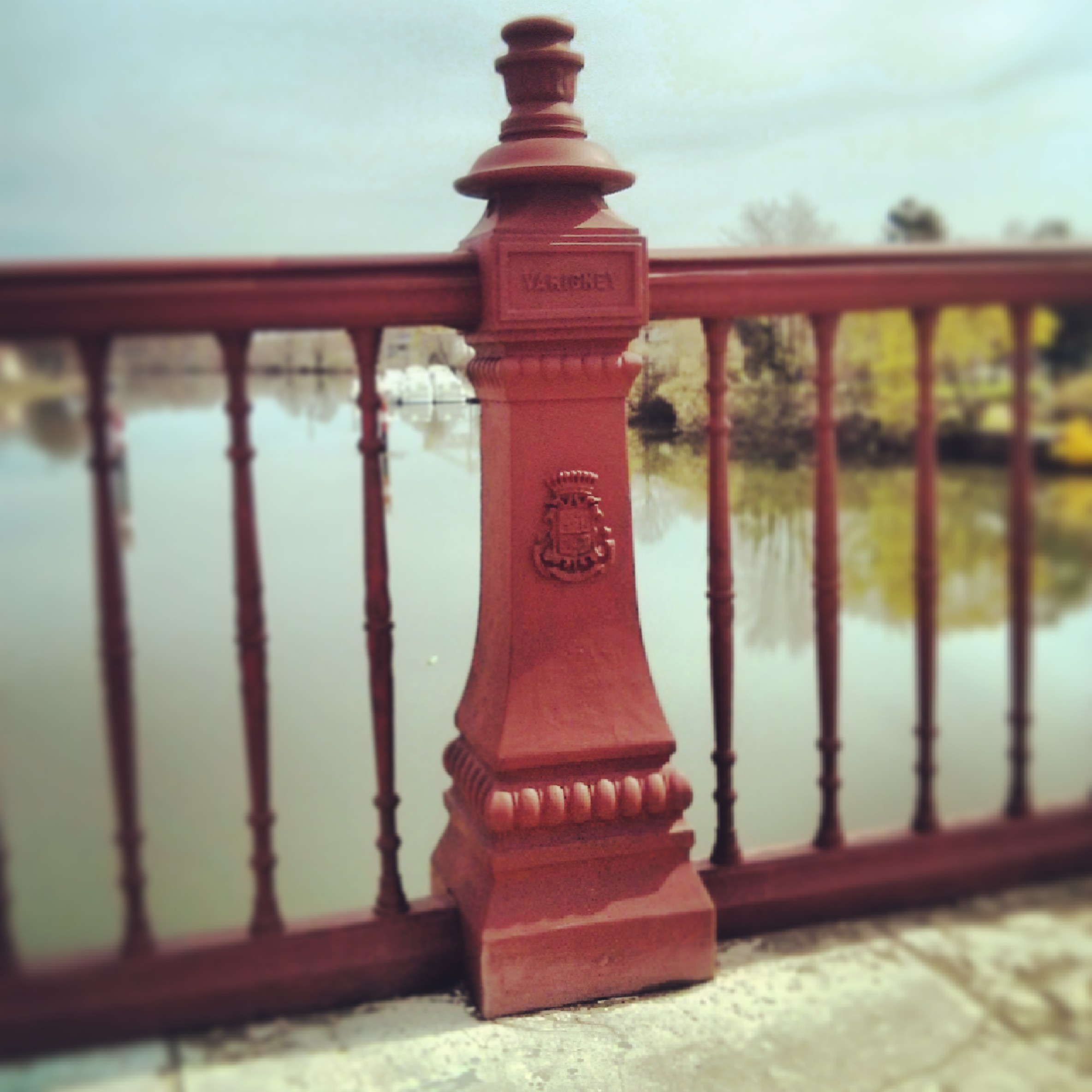 Un élément du parapet en fonte de Varigney du pont de pierre de Gray (Haute-Saône).